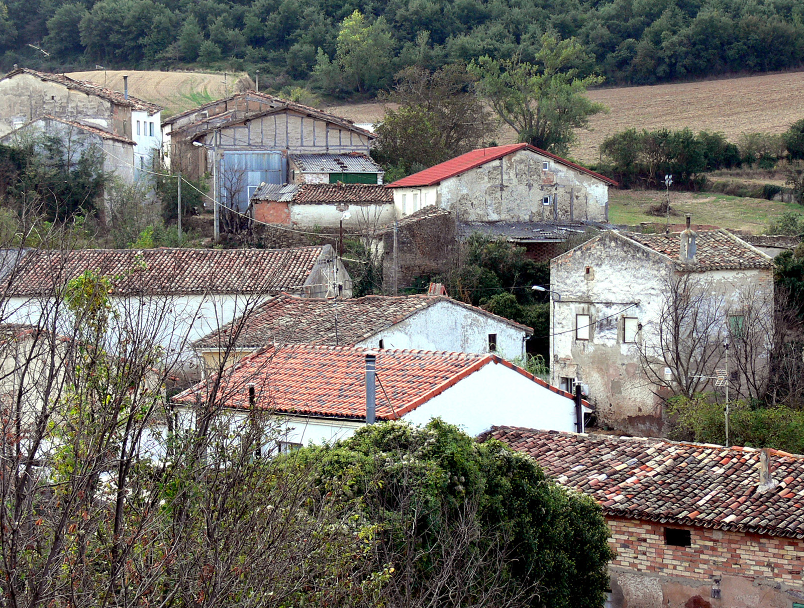 Morales, aldea de Corporales en La Rioja (España).